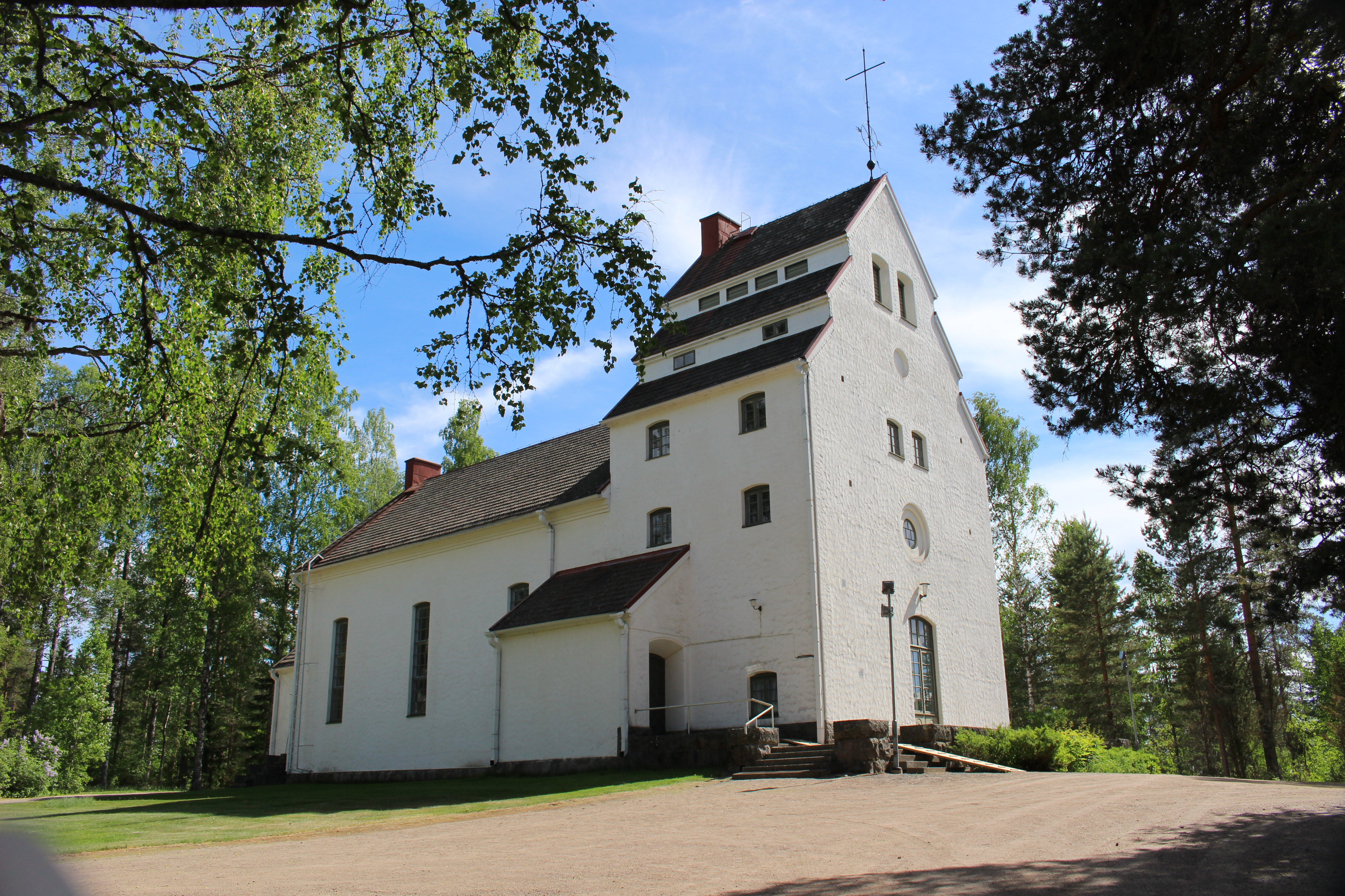 Pohjaslahden kirkko kesällä 2018